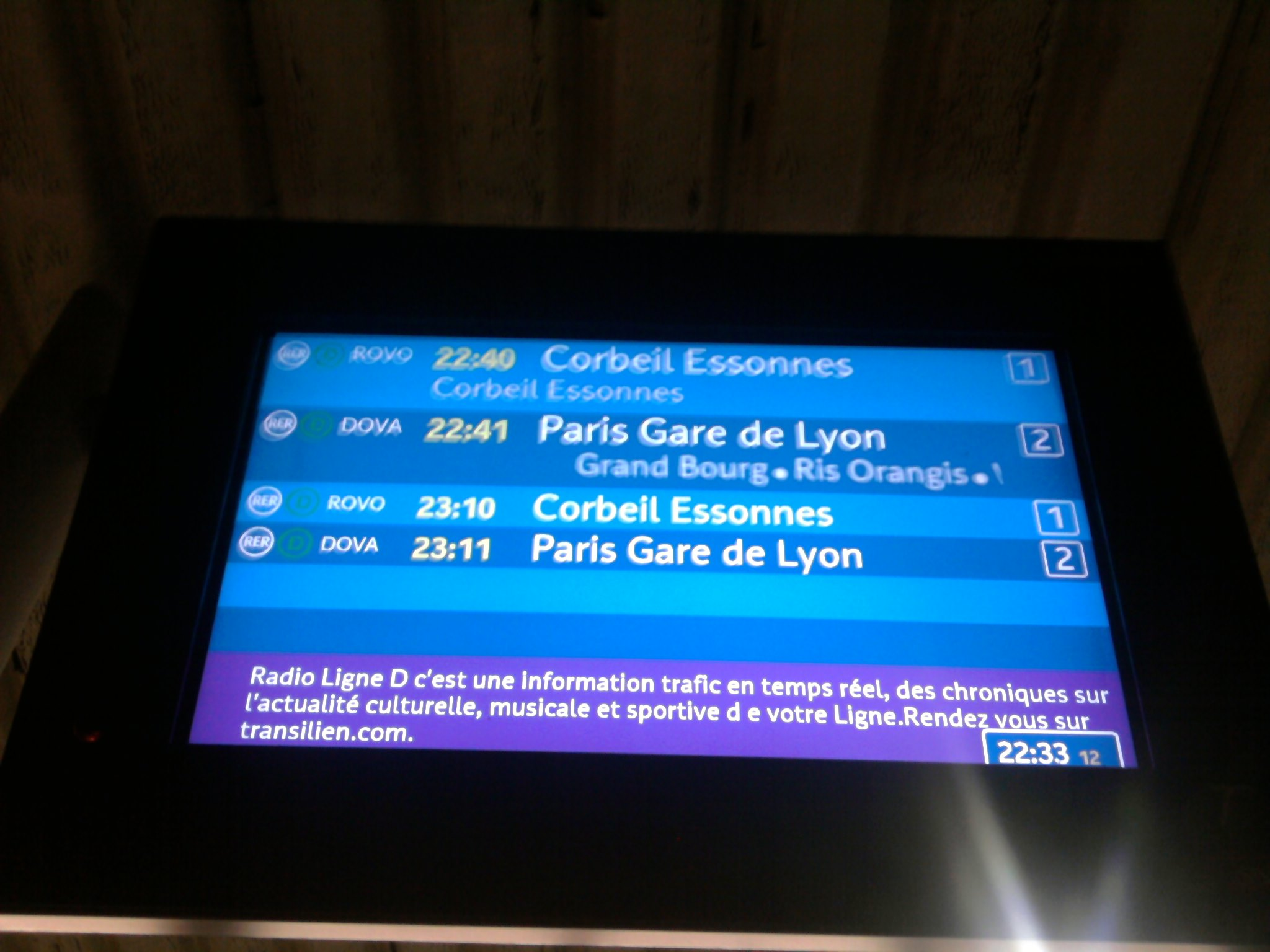 Ecran LCD Infogare en gare d'Evry Val-de-Seine.